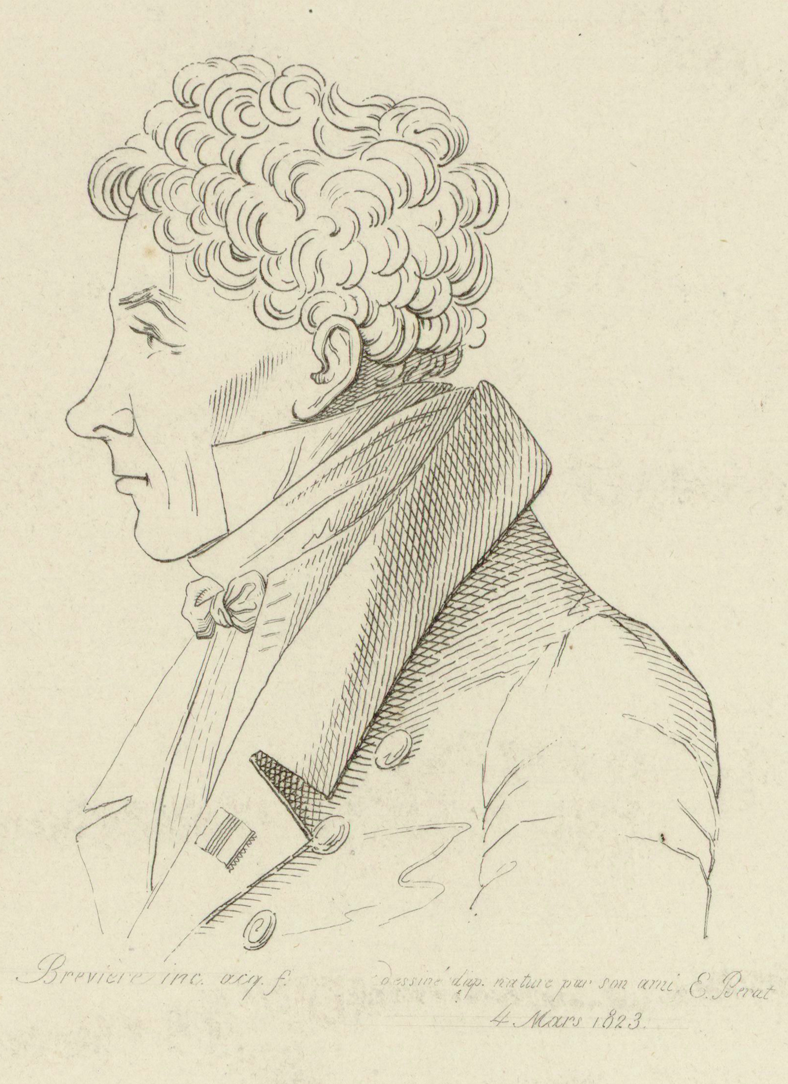 Luigi Cherubini / Louis-Henri Brévière, d'après un dessin d'Eustache Bérat (1823)